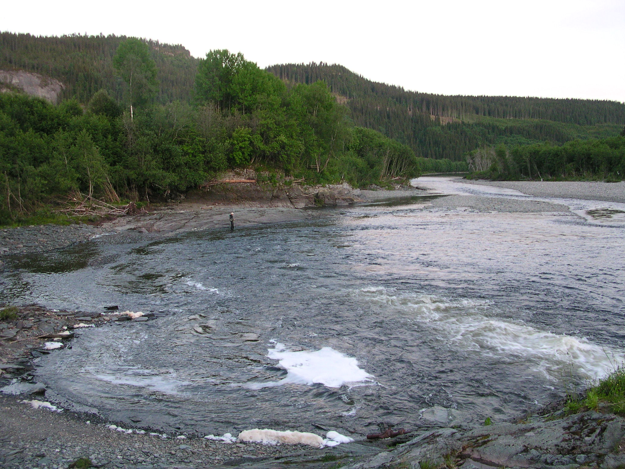 Verdalselva